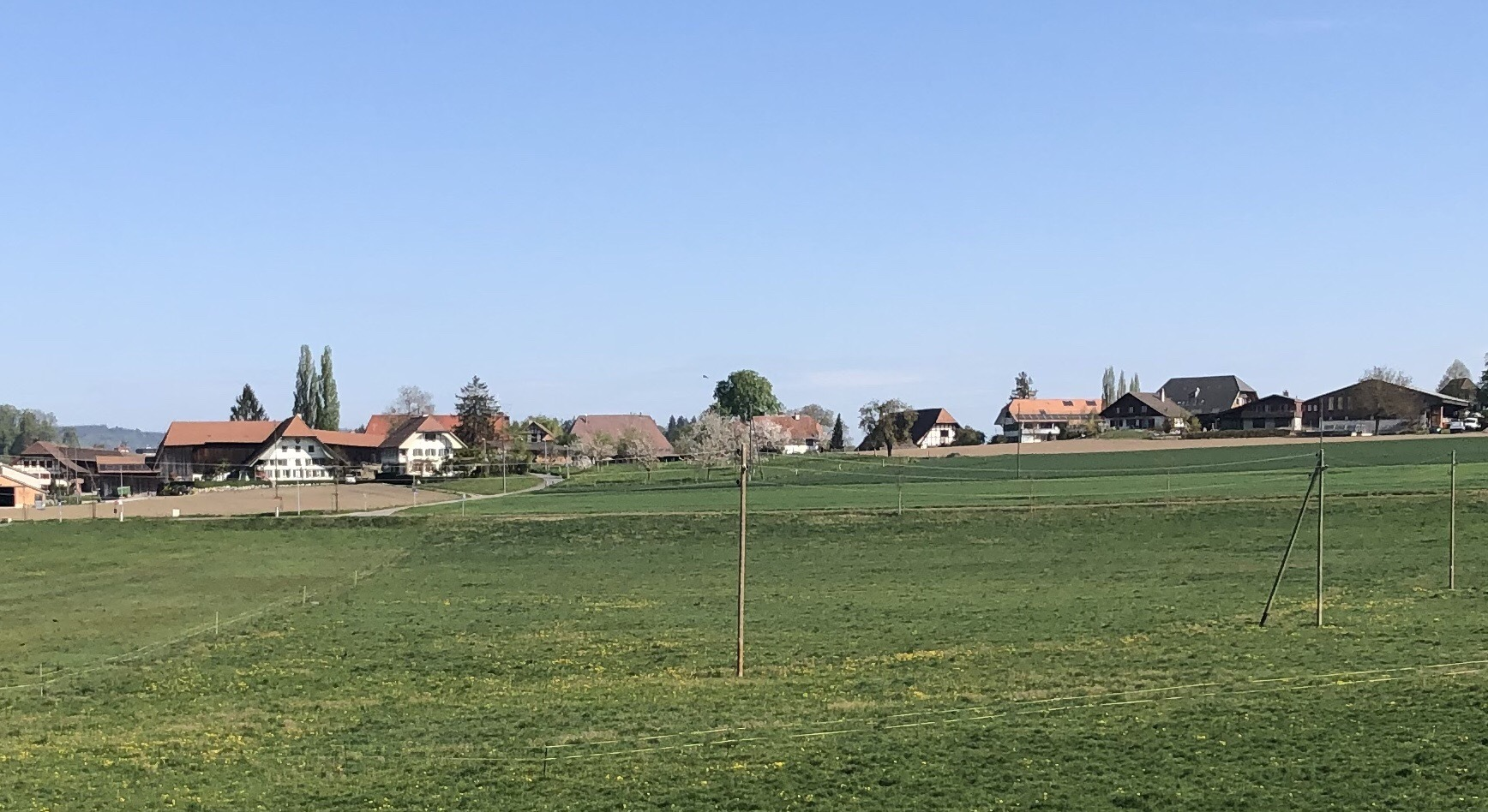 Blick auf Niederbottigen vom Rehhag